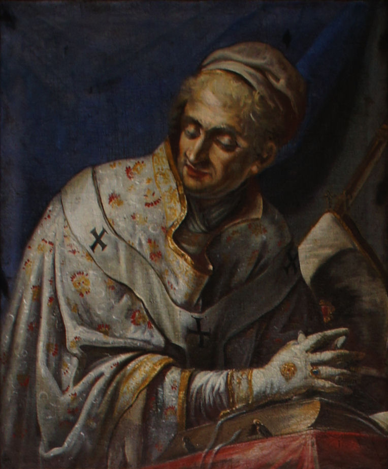 Porträtgemälde von Meginward, Bischof von Freising, im Fürstengang zwischen Fürstbischöflicher Residenz und Freisinger Dom.